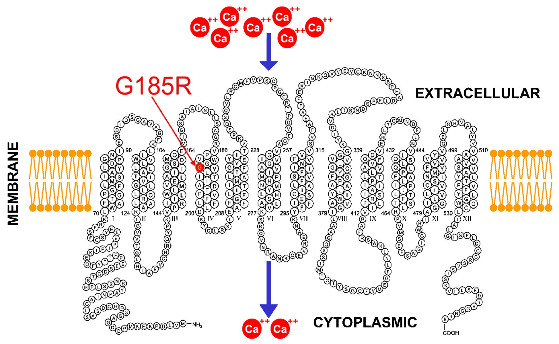 A single mutation of the amino acid glycine (G) to arginine (R) turns a membrane transporter into a calcium channel